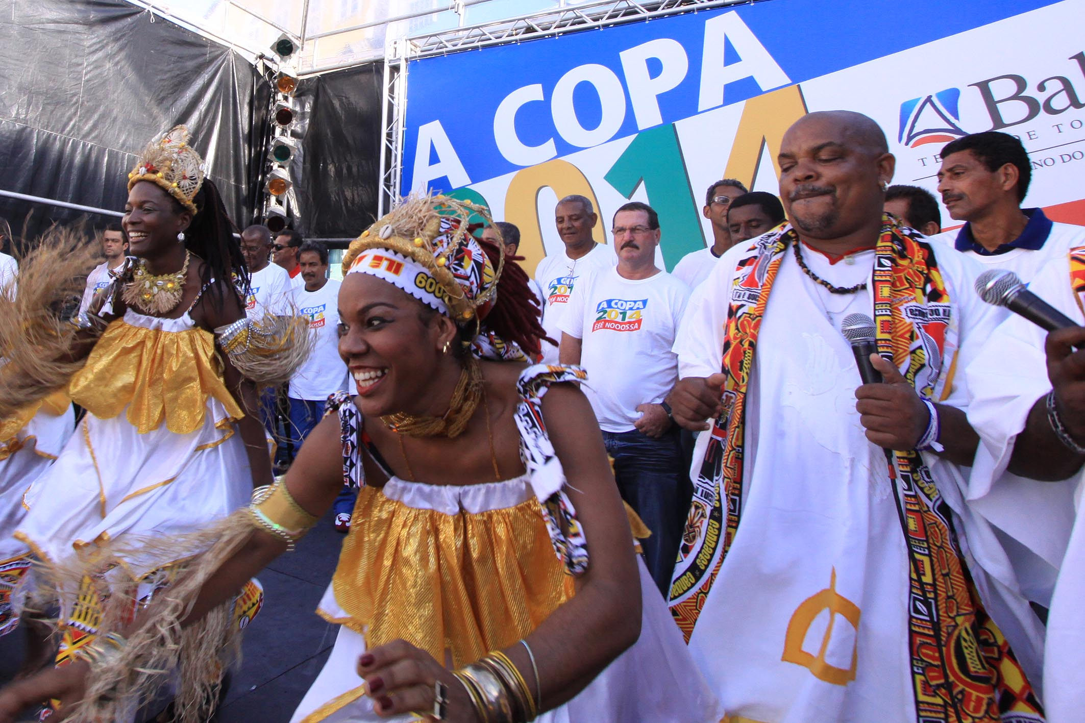 Comemoração no Pelourinho durante anúncio de Salvador como cidade-sede da Copa do Mundo de 2014 Foto: Robson Mendes / AGECOM